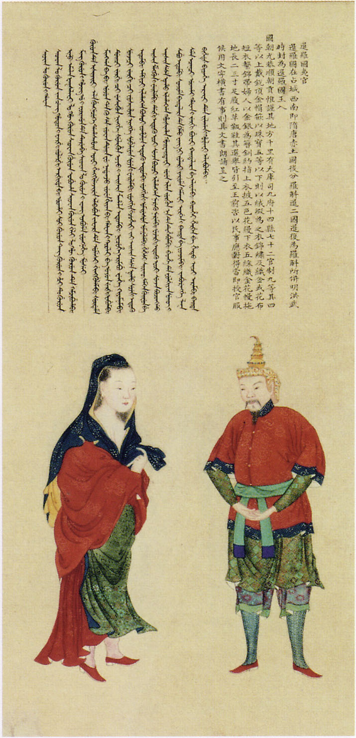 中文（香港）: 暹羅國夷官